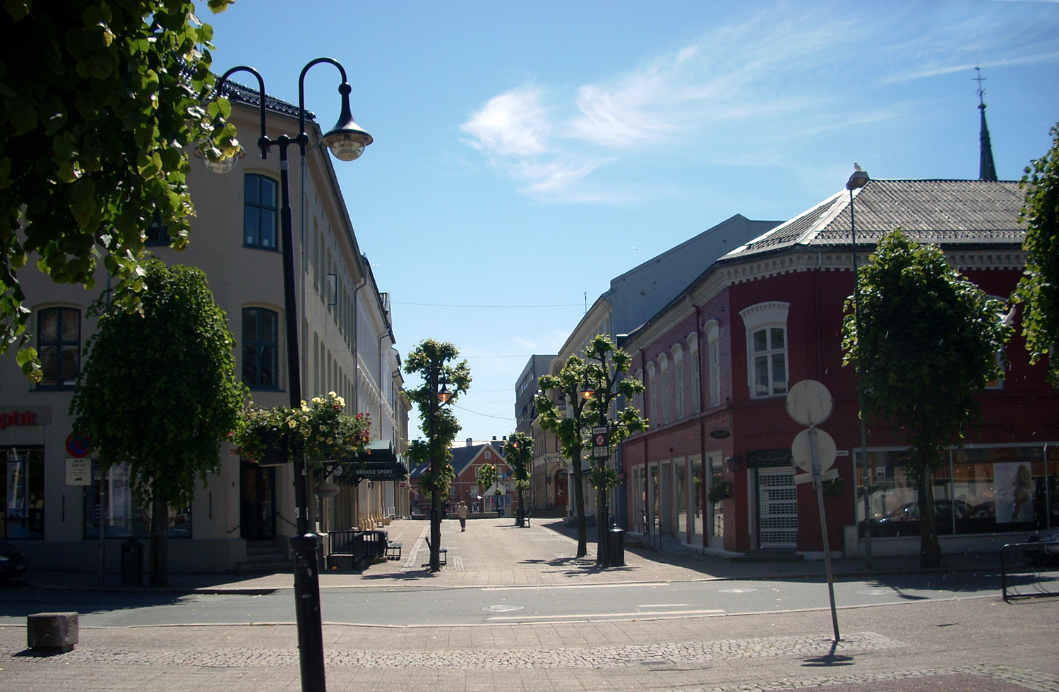 Tollbodgaten i Arendal (gågate)